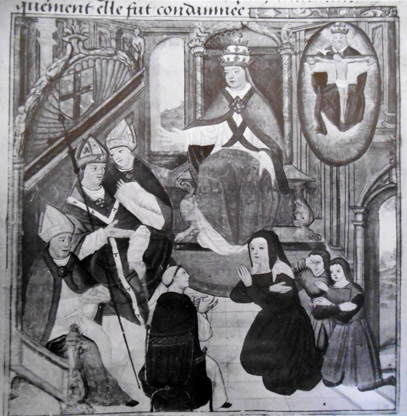 Seule miniature connue représentant le procès en nullité de la condamnation de Jeanne d'Arc. Isabelle Rommée (agenouillée et vêtue de noir) et ses deux fils (figurés comme de jeunes enfants) devant le grand inquisiteur de France, Jean Bréhal (de dos, au premier plan). Le pape Calixte III figure assis sur le trône pontifical en haut de la composition, à côté d'une représentation (inspiratrice ?) de la Trinité. Jouant un rôle important durant le procès en nullité de la condamnation de Jeanne d'Arc - procès permis par Calixte III -, Bréhal semble ici acquiescer à la supplique d'Isabelle Rommée et de ses deux fils. À gauche siègent les commissaires apostoliques nommés par le souverain pontife en vue de mener le procès en nullité. La miniature orne le Manuscrit de Diane de Poitiers rédigé dans la première moitié du XVIe siècle pour la maîtresse du roi Henri II, ainsi que l'atteste la préface dédicatoire mentionnant le père et le grand-père de Diane. Le manuscrit est actuellement conservé dans une collection privée britannique.